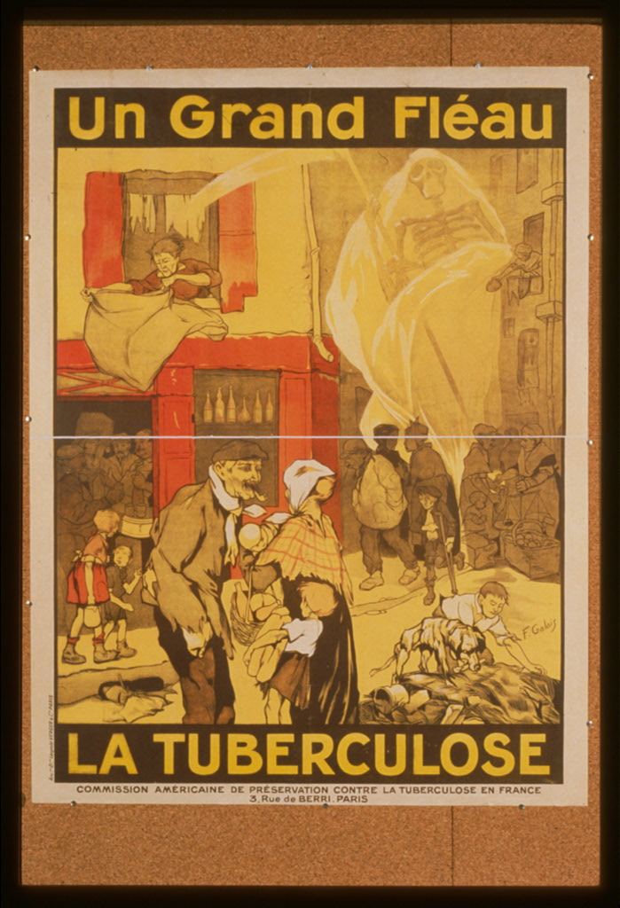 Affiche de 1917 qui intervient dans une campagne de prévention suite à la Grande Guerre qui s'accompagne d'une recrudescence de la mortalité tuberculeuse : dans une scène de rue miséreuse de la vie quotidienne, le premier et le second plan montrent des personnes victimes potentielles de la tuberculose en raison de la promiscuité, du manque d'hygiène et de l'alcool supposé être le lit de la tuberculose, les ouvriers pouvant dépenser une grande partie de leur salaire en alcool, entraînant la sous-alimentation et la malnutrition. L'arrière-plan est dominé par la Grande Faucheuse.